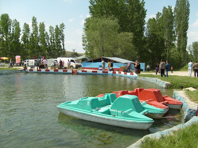 Eskişehir ili Sivrihisar ilçesi Kaymaz Beldesi geleneksel kuru fasulye festivalinden bir görüntü